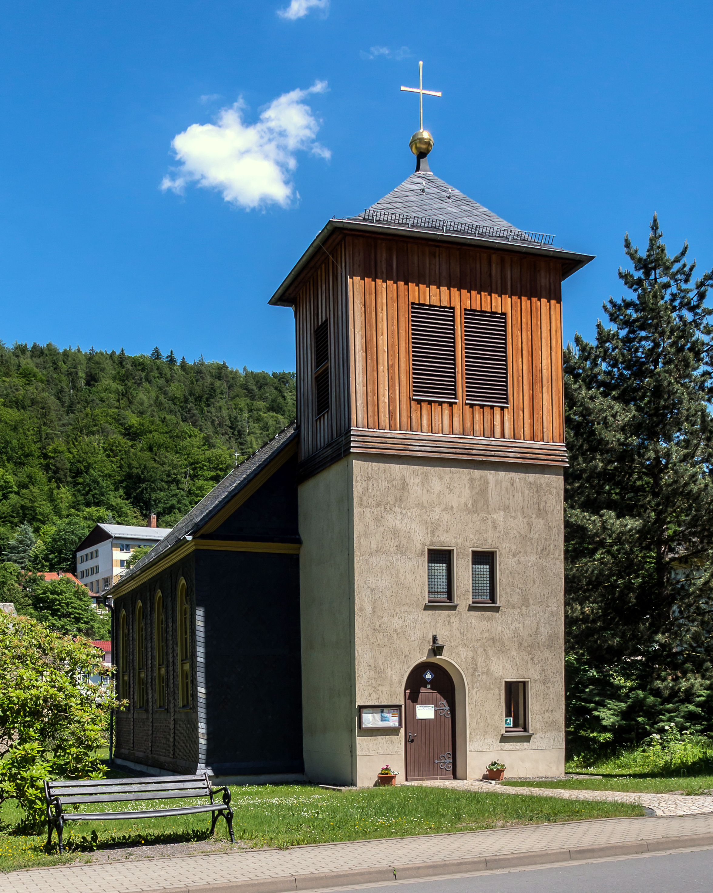 Denkmalgeschützte Kirche Schwarzburg Hauptstraße 4